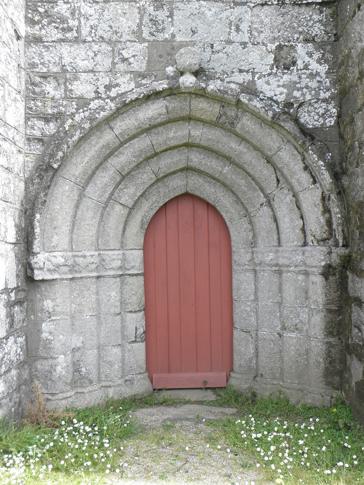 Porte occidentale de la chapelle Notre-Dame-de-Kérinec en Poullan-sur-Mer (29).